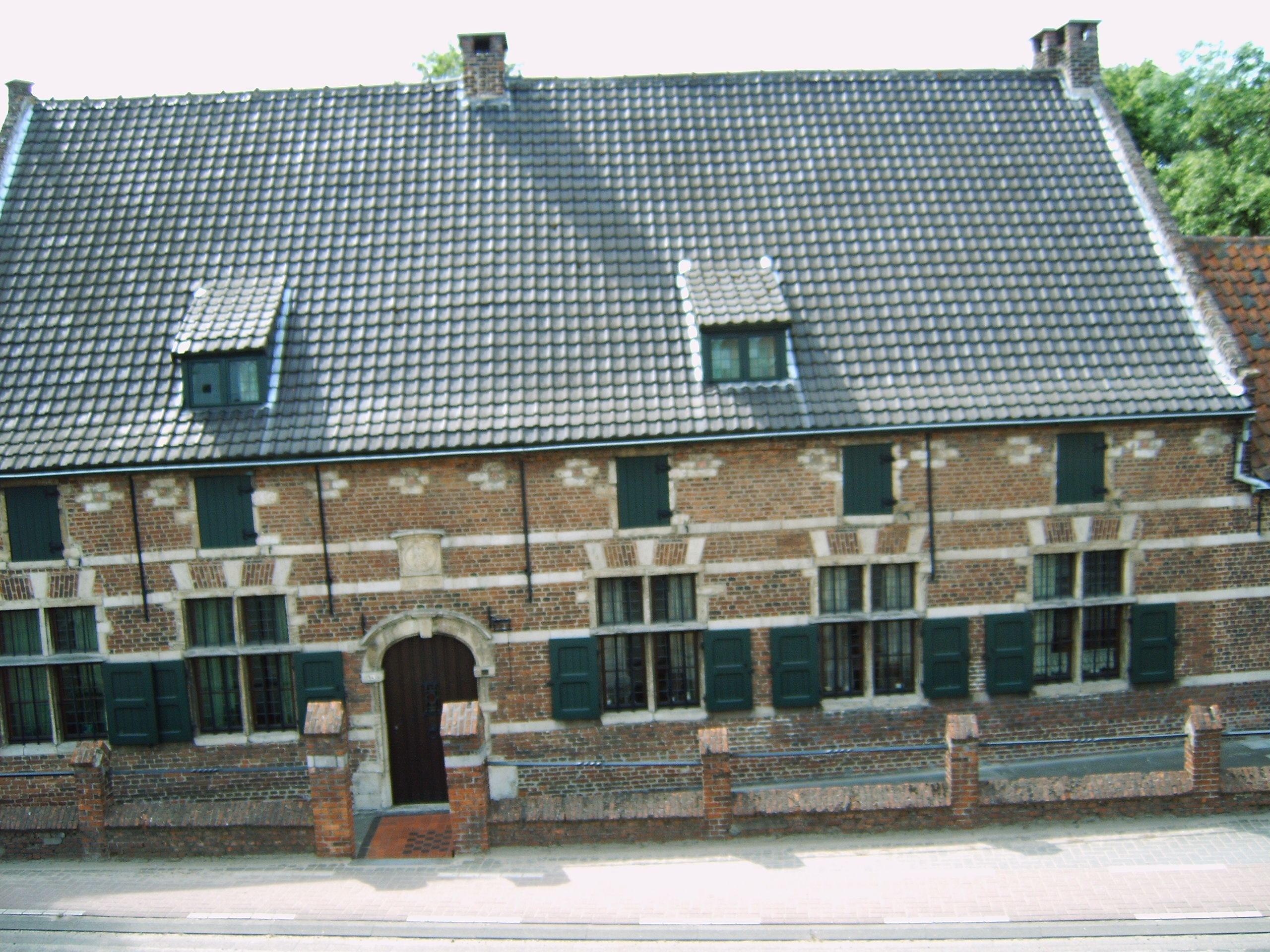 Betekom, eigen foto. Lodewijk Scharpé woonde destijds in het molenhuis, vandaag ook gekend als het Scharpéhuis.